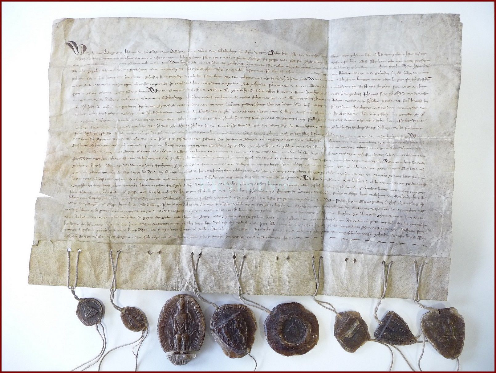 Carta de Erstein, feudo imperial de los condes de Werd, Landgraves de la Baja Alsacia, del año 1303. (Original en los Archivos de la ciudad de Erstein). Esta Carta confirma los derechos de los ciudadanos de Erstein por Sigismund von Werd y fue garantizada por la firma de los grandes señores de Alsacia. Descripción de los sellos de izquierda a derecha: •Sigismund von Werd • Adelheid von Blankenberg, esposa de Sigismund von Werd • Friedrich von Lichtenberg, obispo de Estrasburgo • Johannes von Lichtenberg, Landvogt de Alsacia • Heinrich von Blankenberg • Johannes von Werd, Landgrave de Alsacia • Walther von Gerolseck • Anselm von Rappoltstein • Friedrich von der Dick • Sello de la ciudad de Erstein